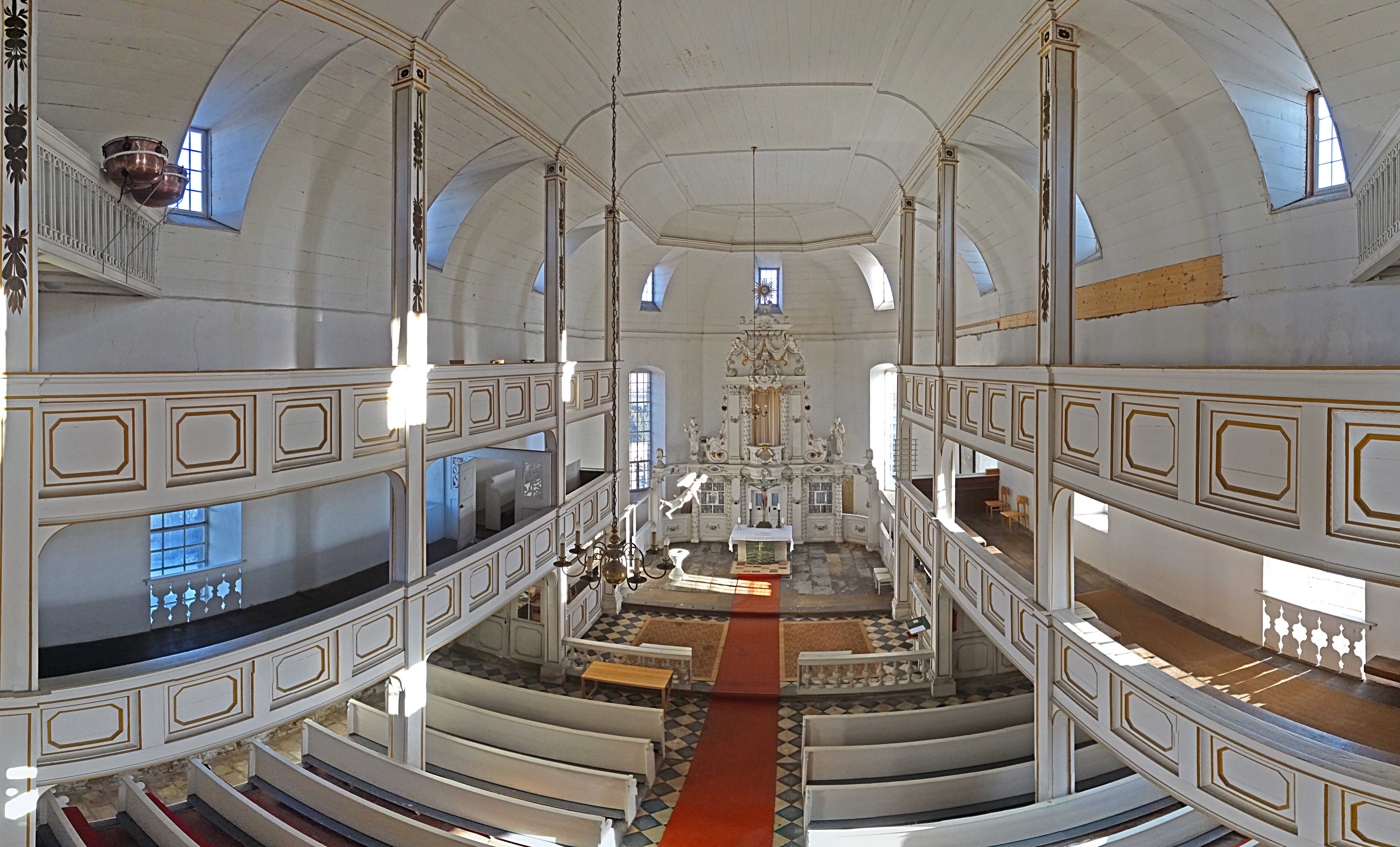 Blick von der Orgel-Empore in der Dorfkirche St. Peter und Paul (Elxleben, Ilm-Kreis)